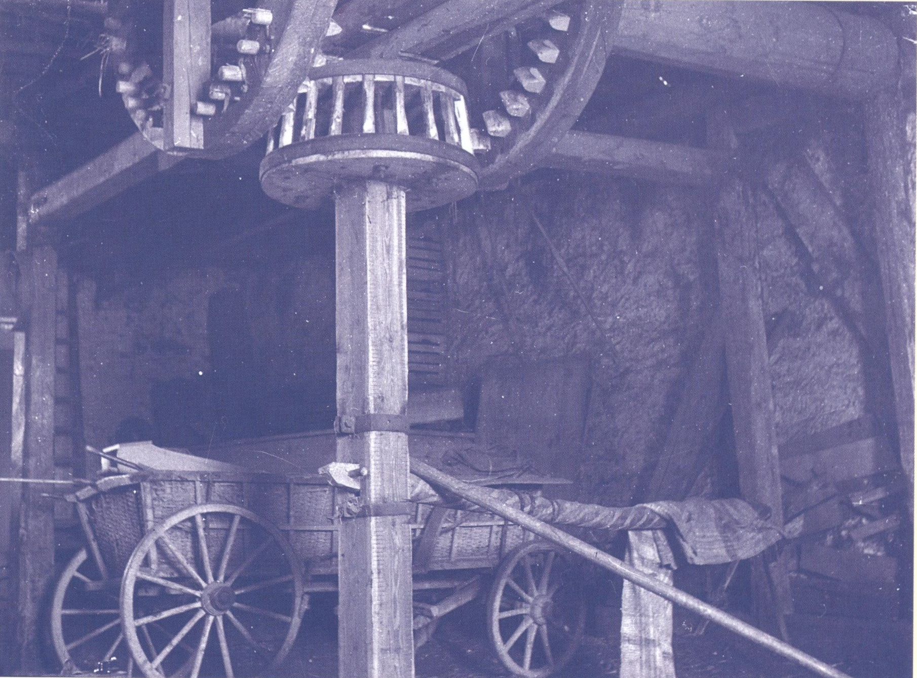 Mangeľ v stodole